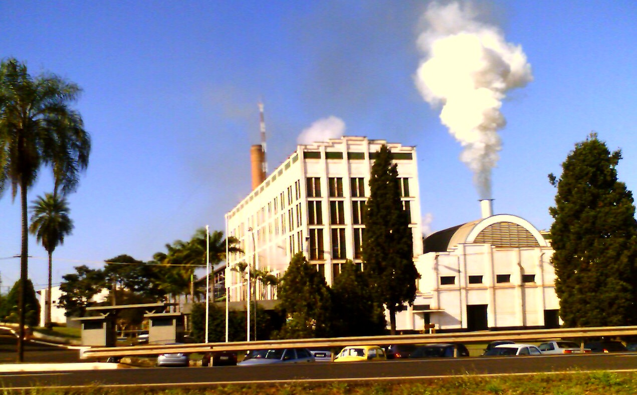 São Francisco S/A Ethanol Production Facility at Sertãozinho, São Paulo, Brazil